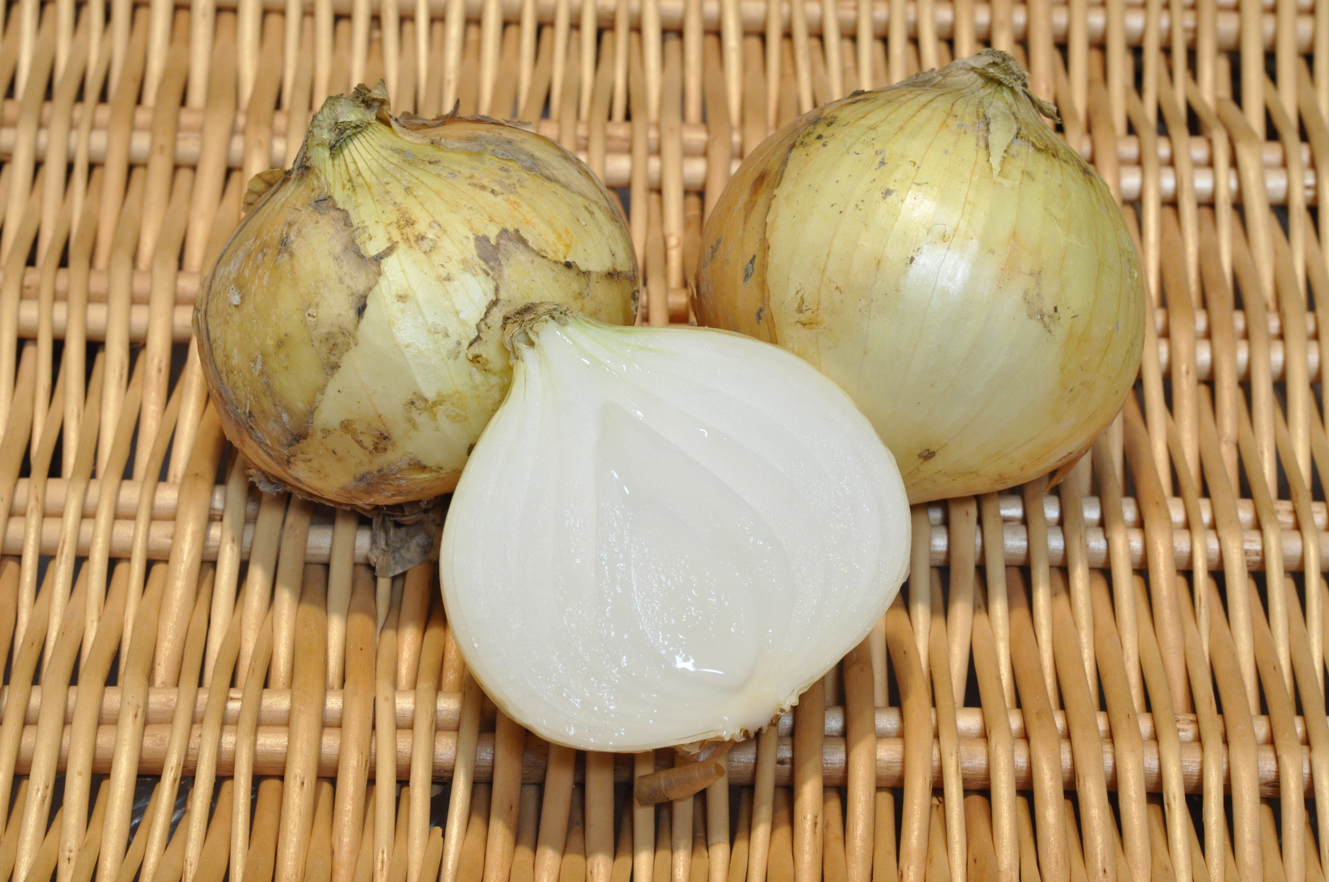 新たまねぎ